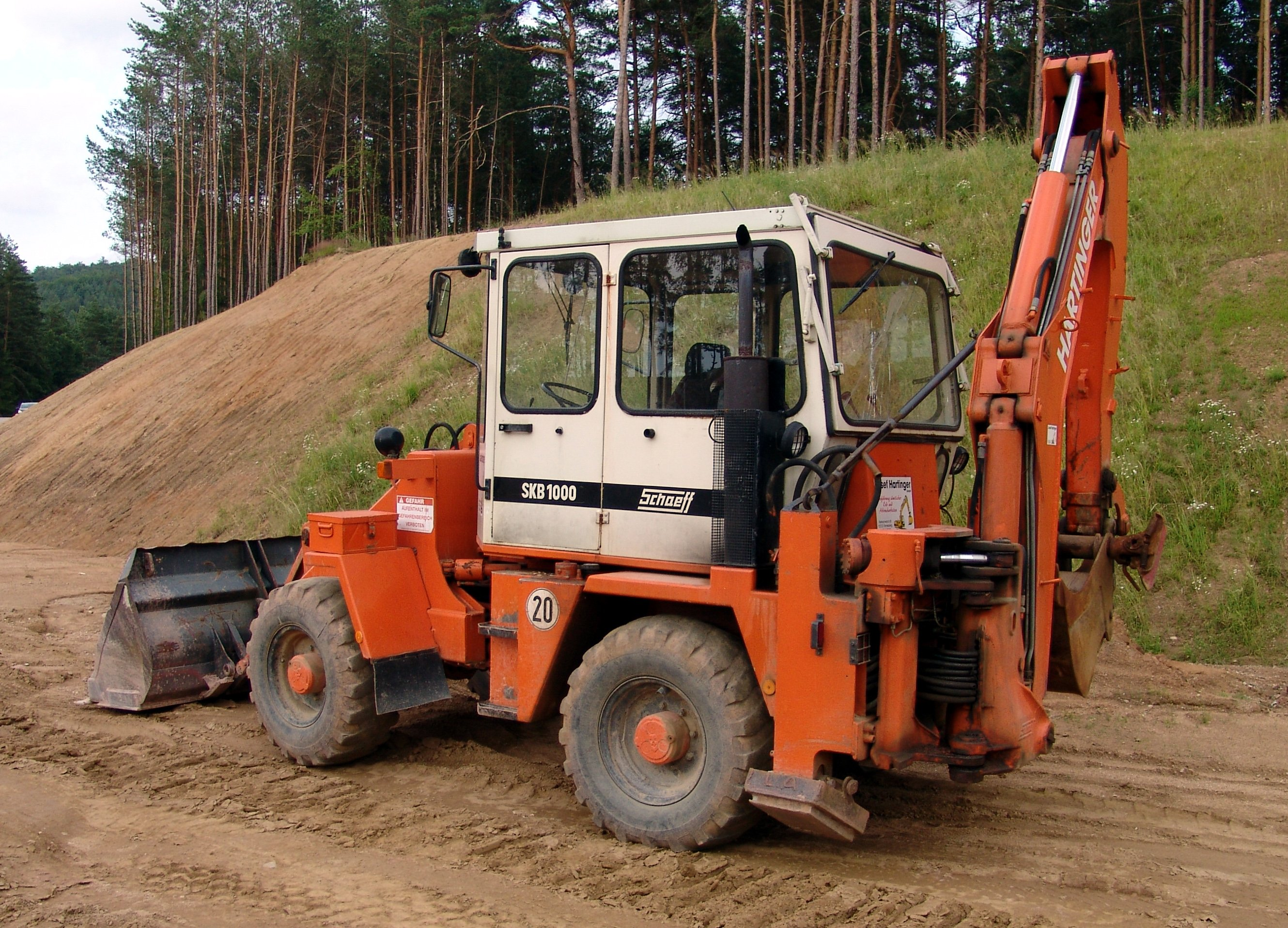 Schaeff Baggerlader der Firma Hartinger auf einem Teilstück (im Bau) der BAB 6 zwischen Amberg und dem Kreuz Oberpfälzer Wald